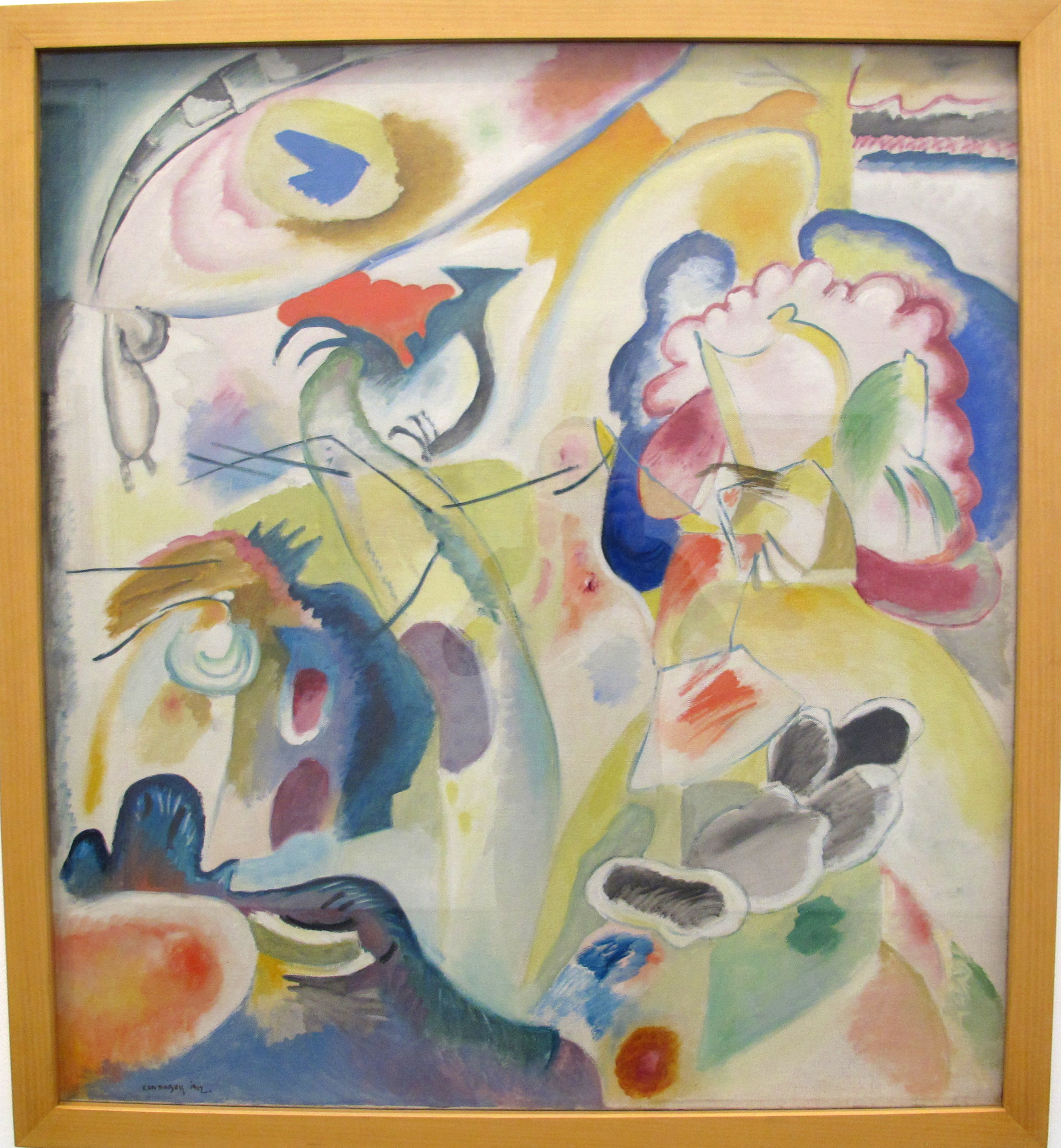 Vasily kandinsky, improvvisazione n. 29 (il cigno), 1912.JPG